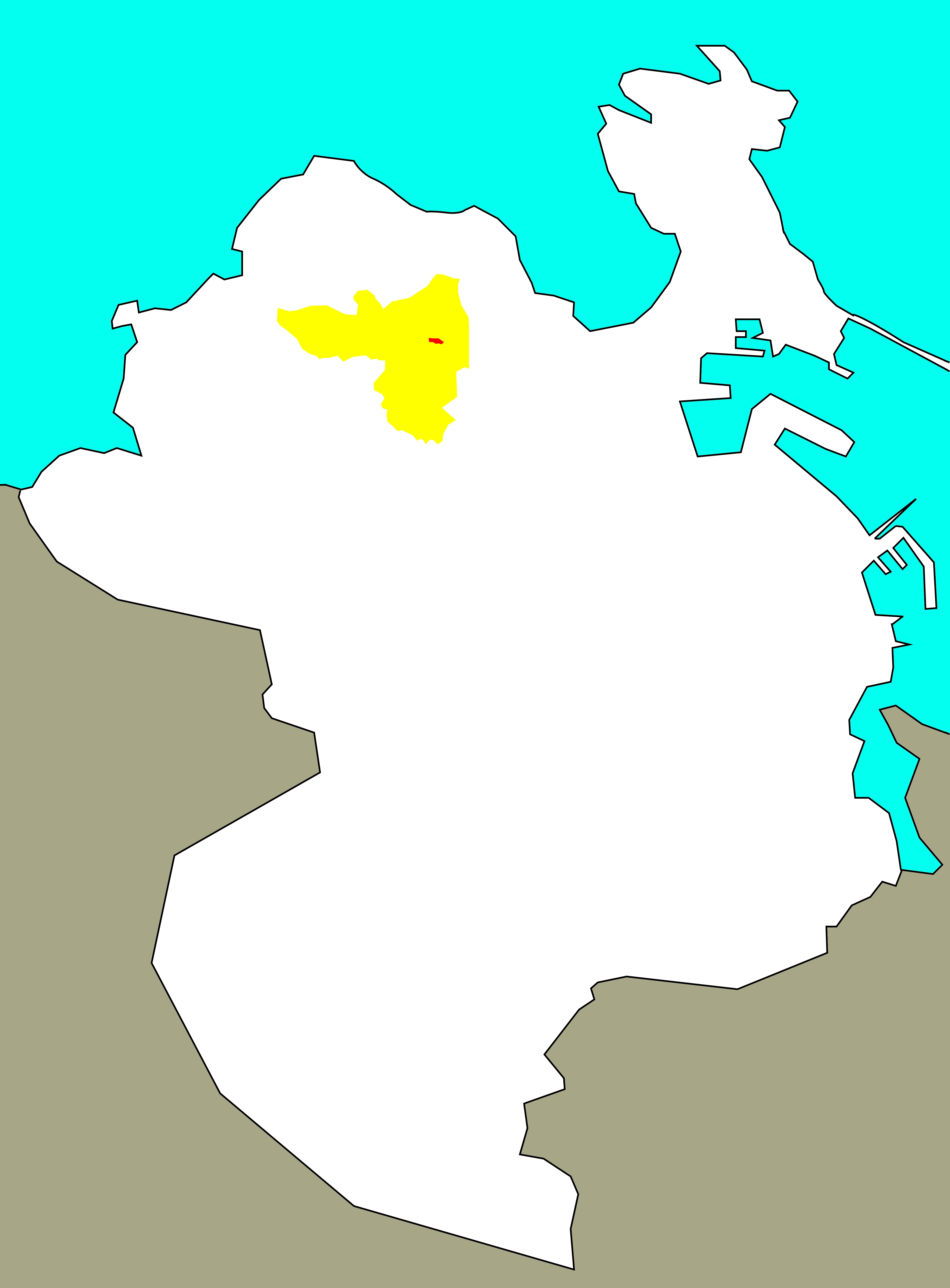 Situación das Pedreiras no "barrio-territorio" de San Pedro de Visma.[1]